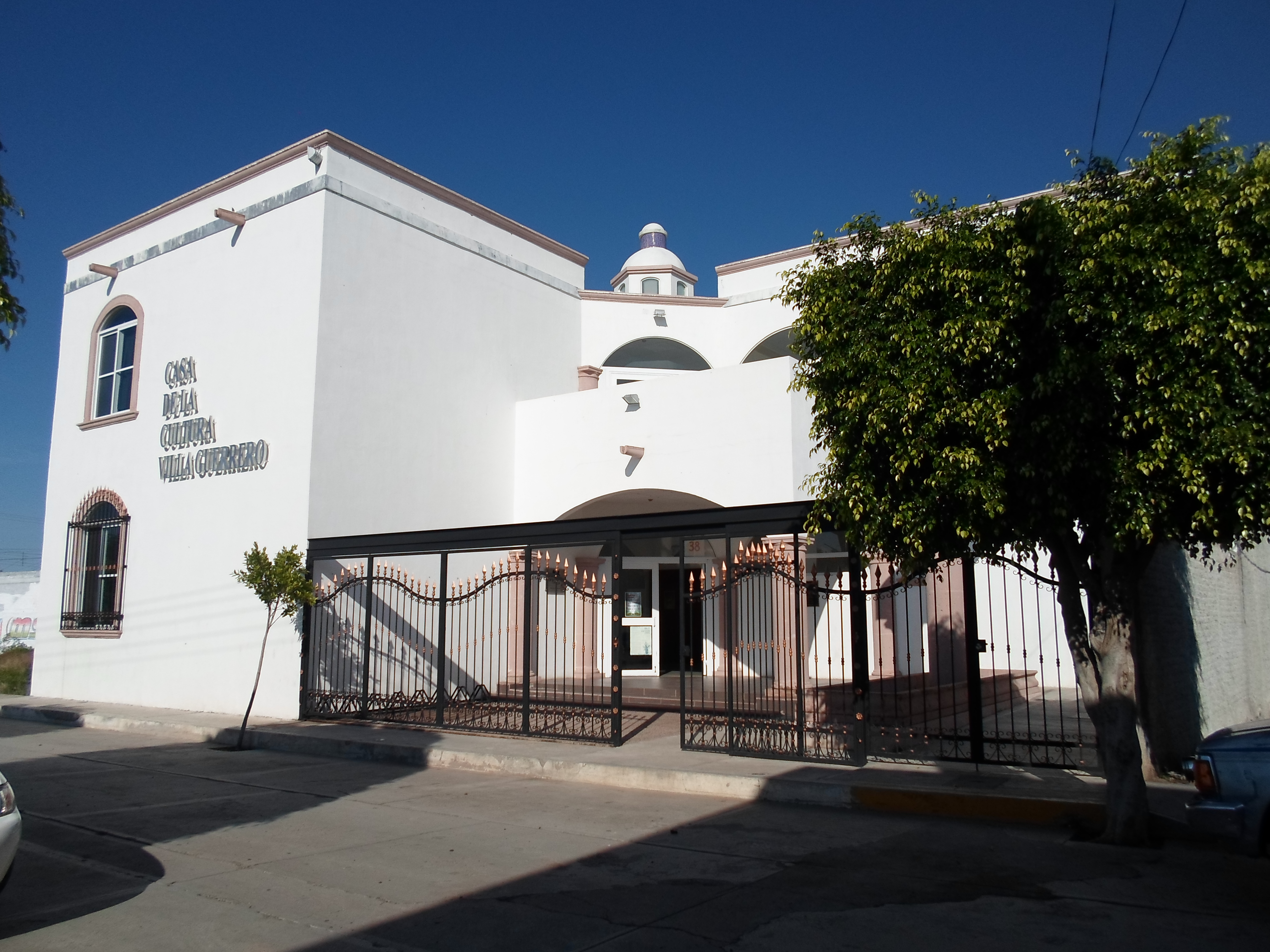 Casa de la cultura del municipio de Villa Guerrero Jalisco